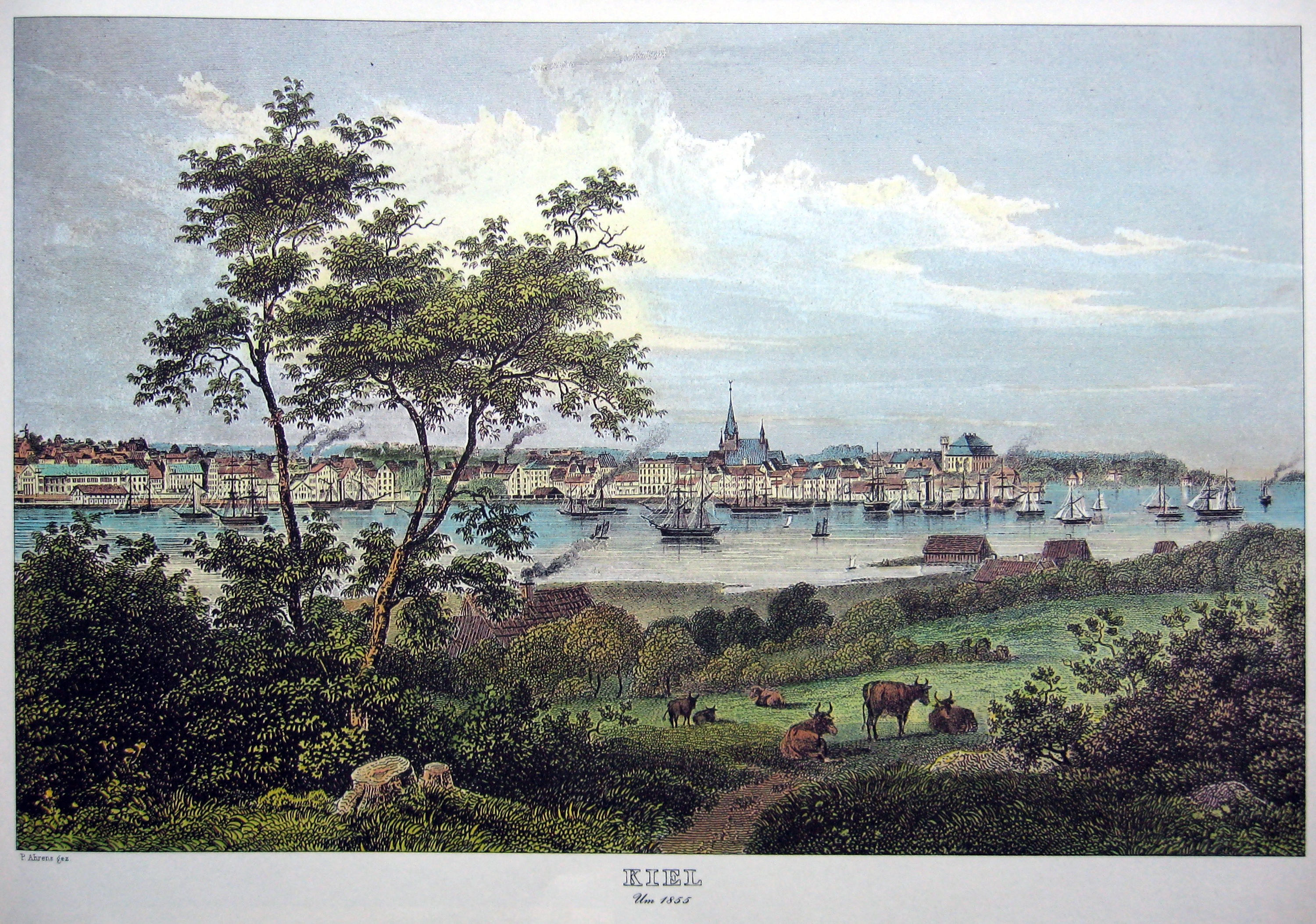 Kiel um 1855: Blick vom Ostufer der Kieler Förde (vom späteren Stadtteil Kiel-Gaarden aus) zum Westufer auf den historischen Stadtkern mit der Nicolai-Kirche im Zentrum, rechts davon das Kieler Schloss. (Grafik: P.Ahrens)